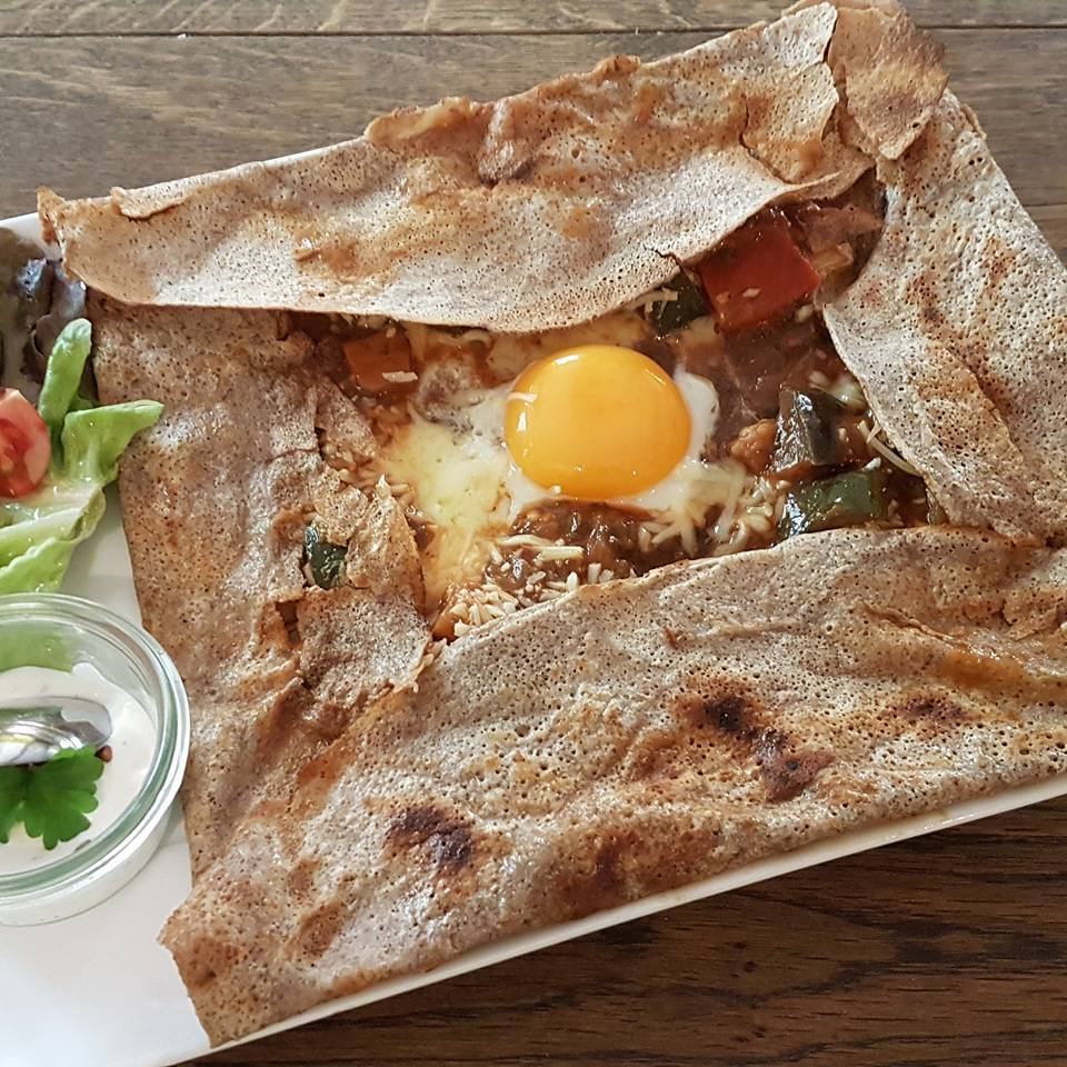 Galette 100% Buchweizen mit Ratatuille, Spiegelei, Käse